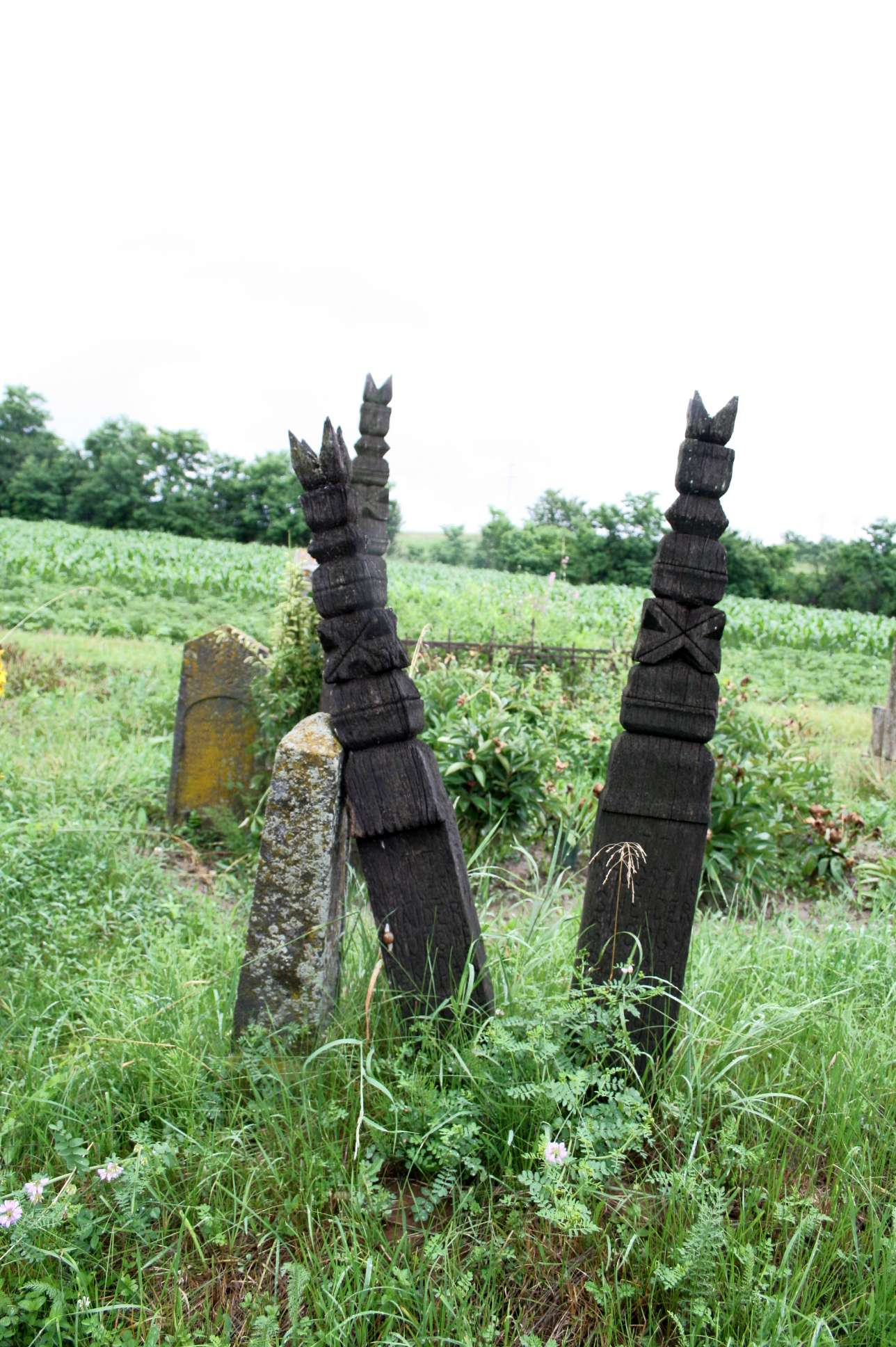 Olthévízi temető gombosfákkal (Erdély)